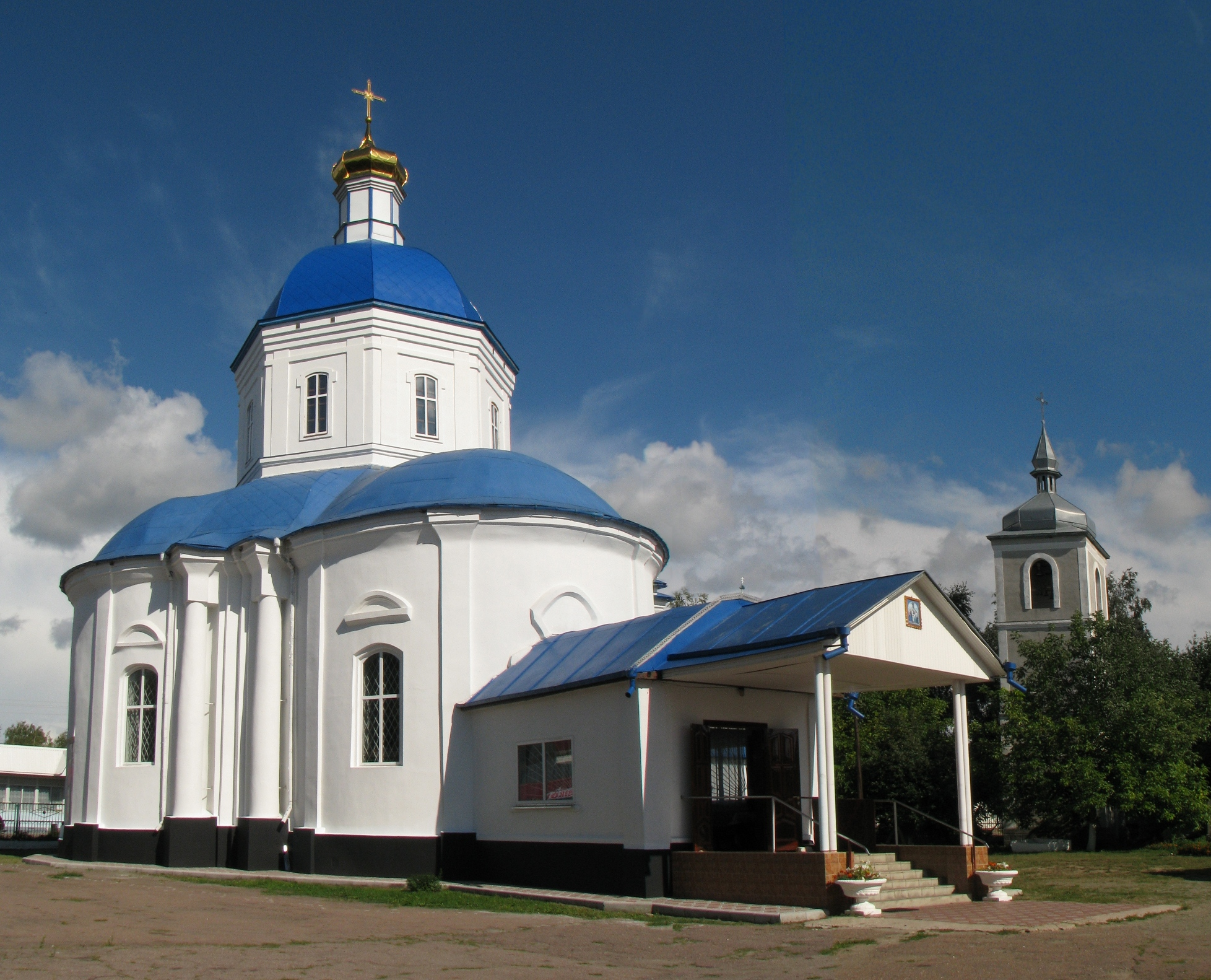 Свято-Троїцький храм (1765), УПЦ (МП)